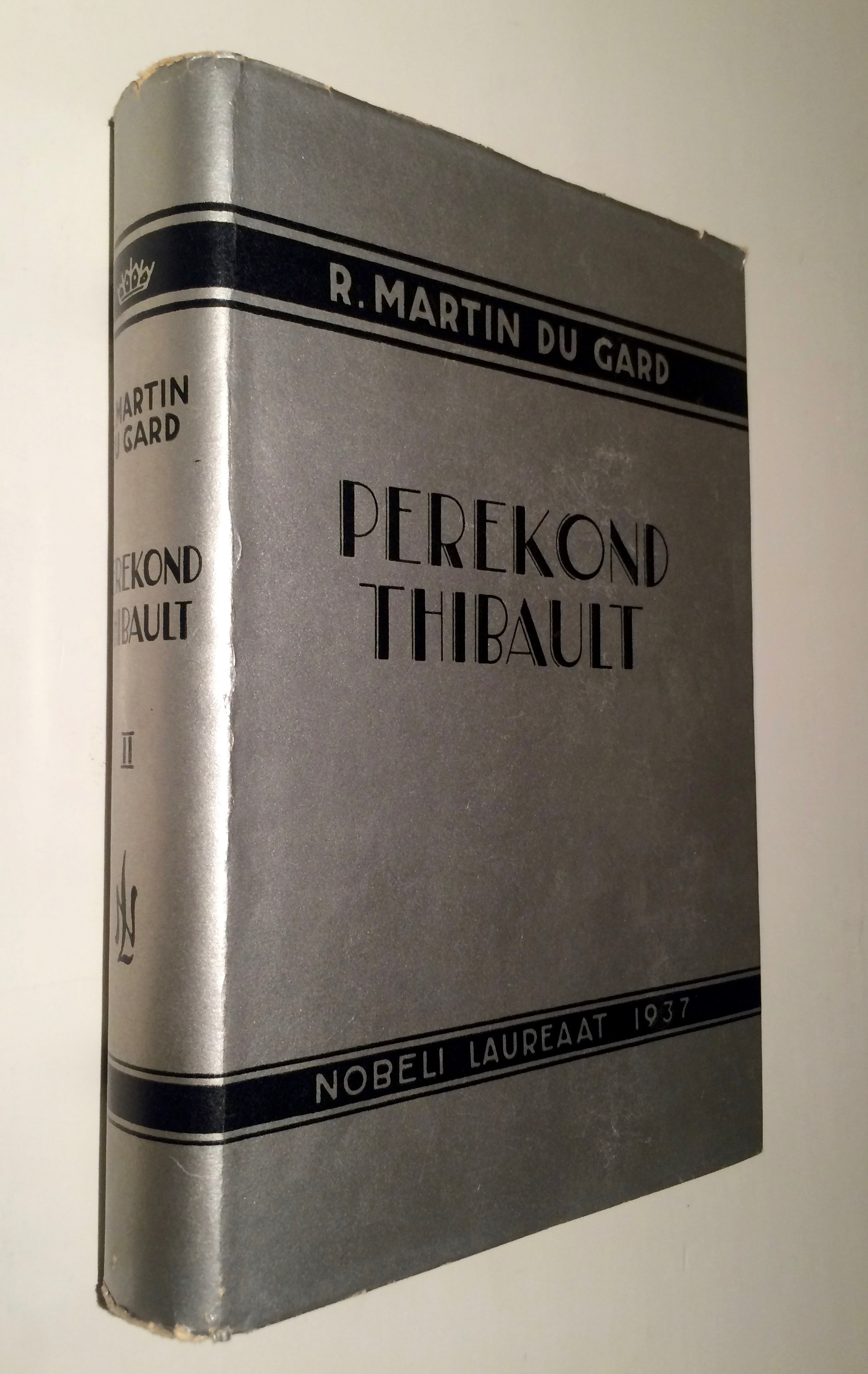 Ernst Kollomi üks ümbrispaberi kujundus